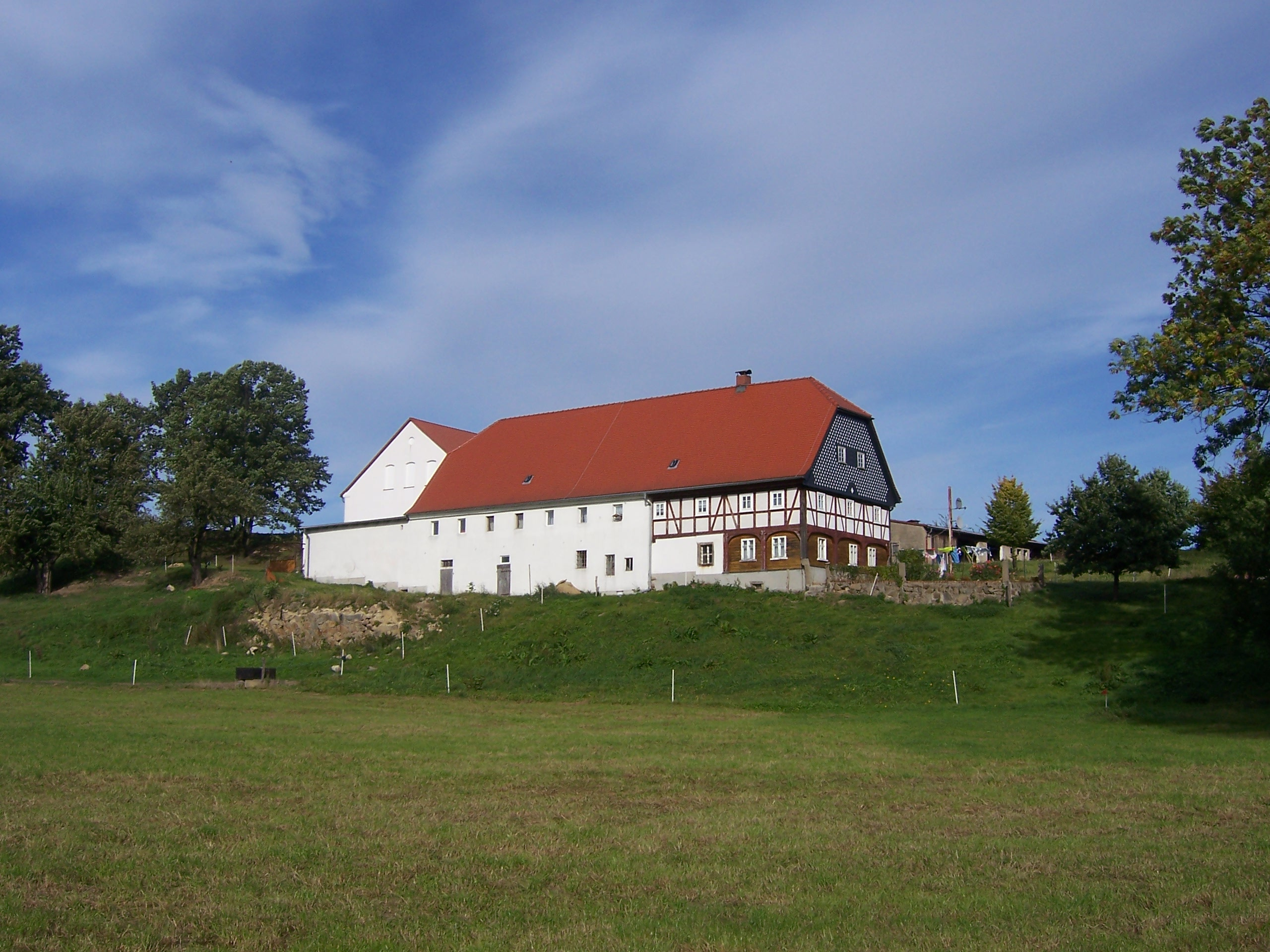 Erweitertes Umgebindehaus in Altbernsdorf auf dem Eigen, Kleine Seite 26